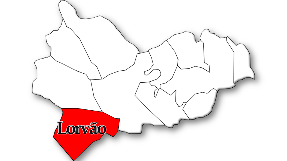 População